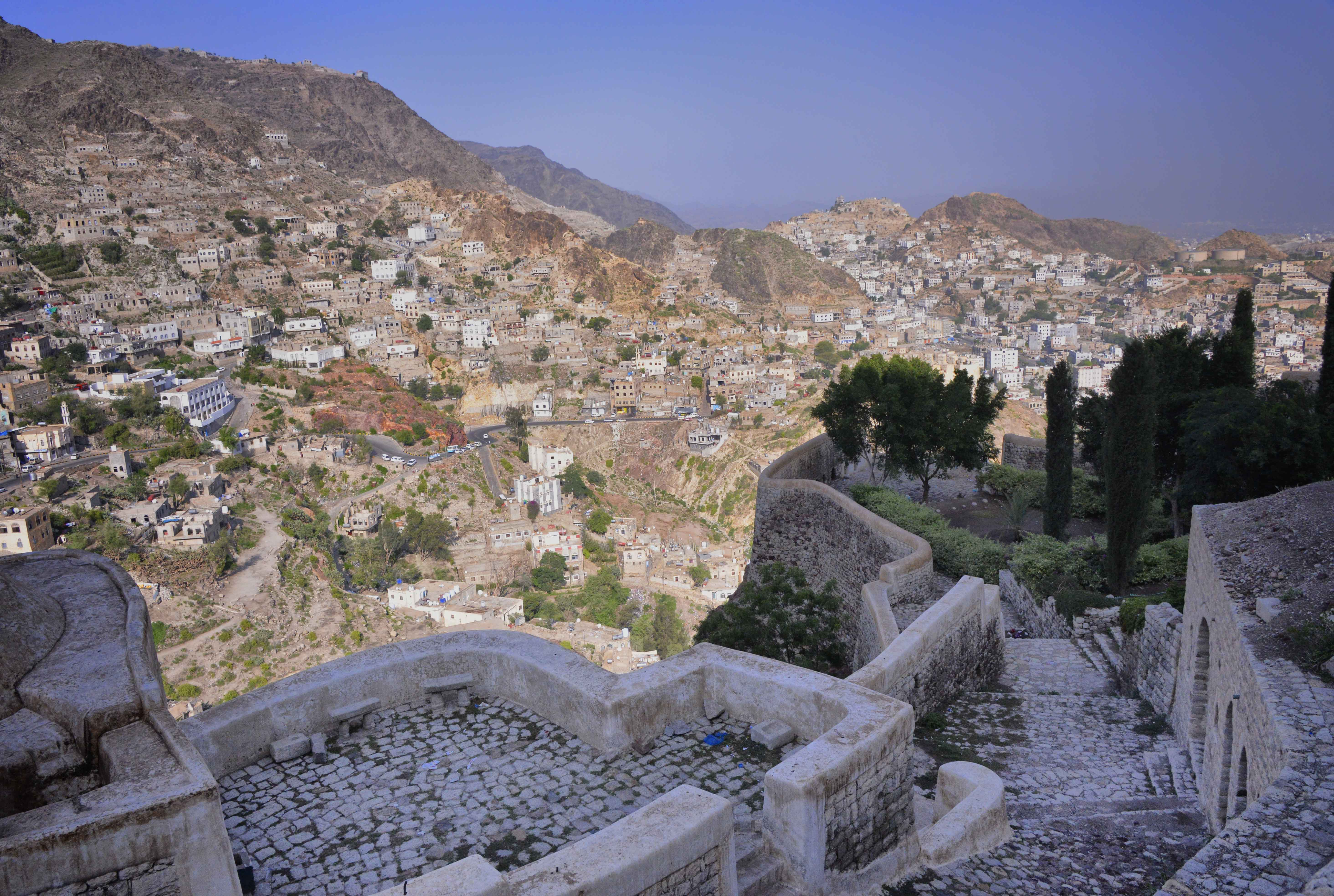 Yemen